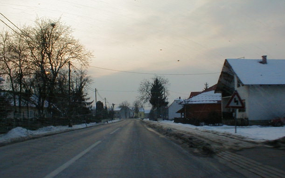 Luka - Cesta